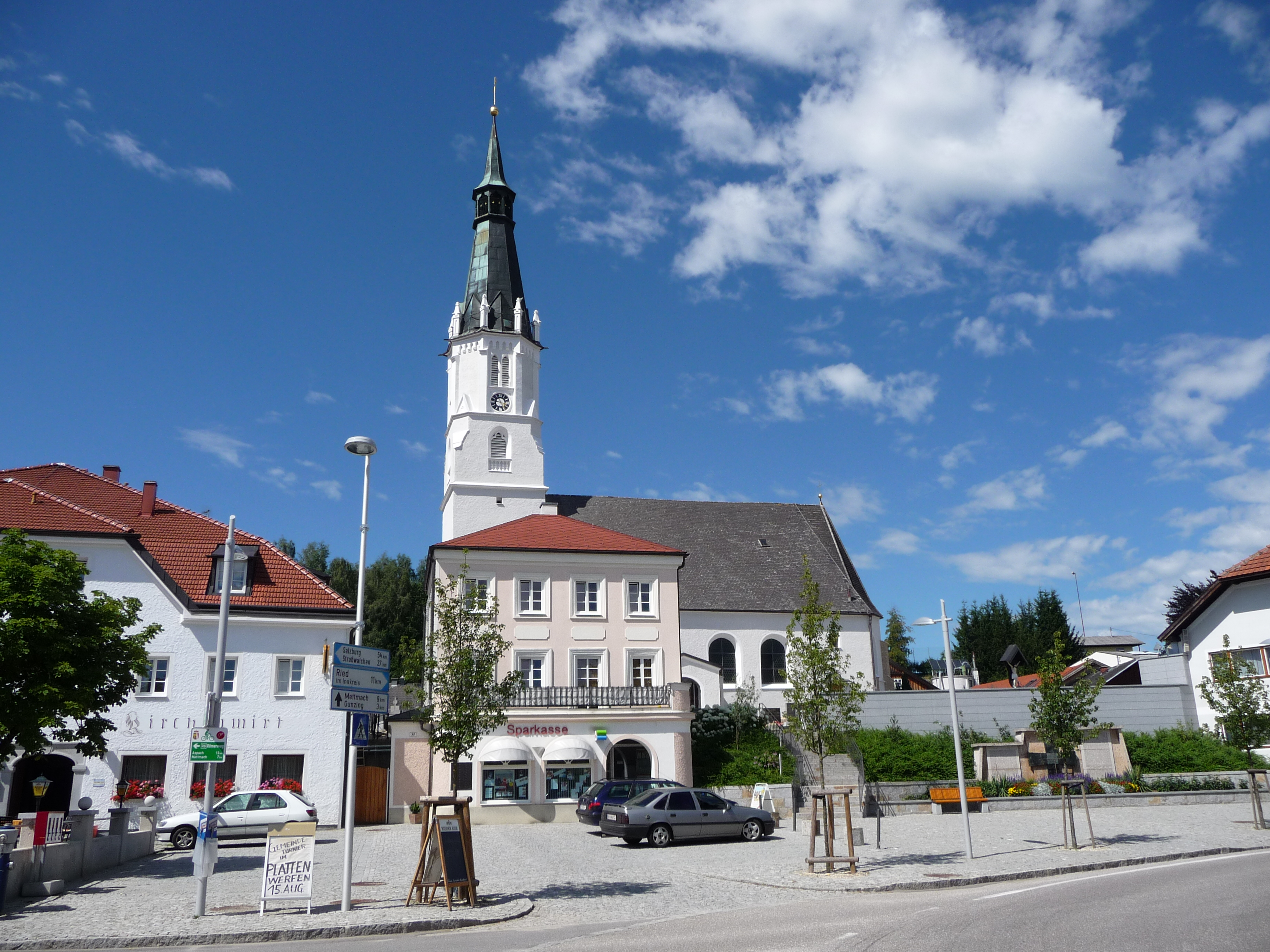 Lohnsburg